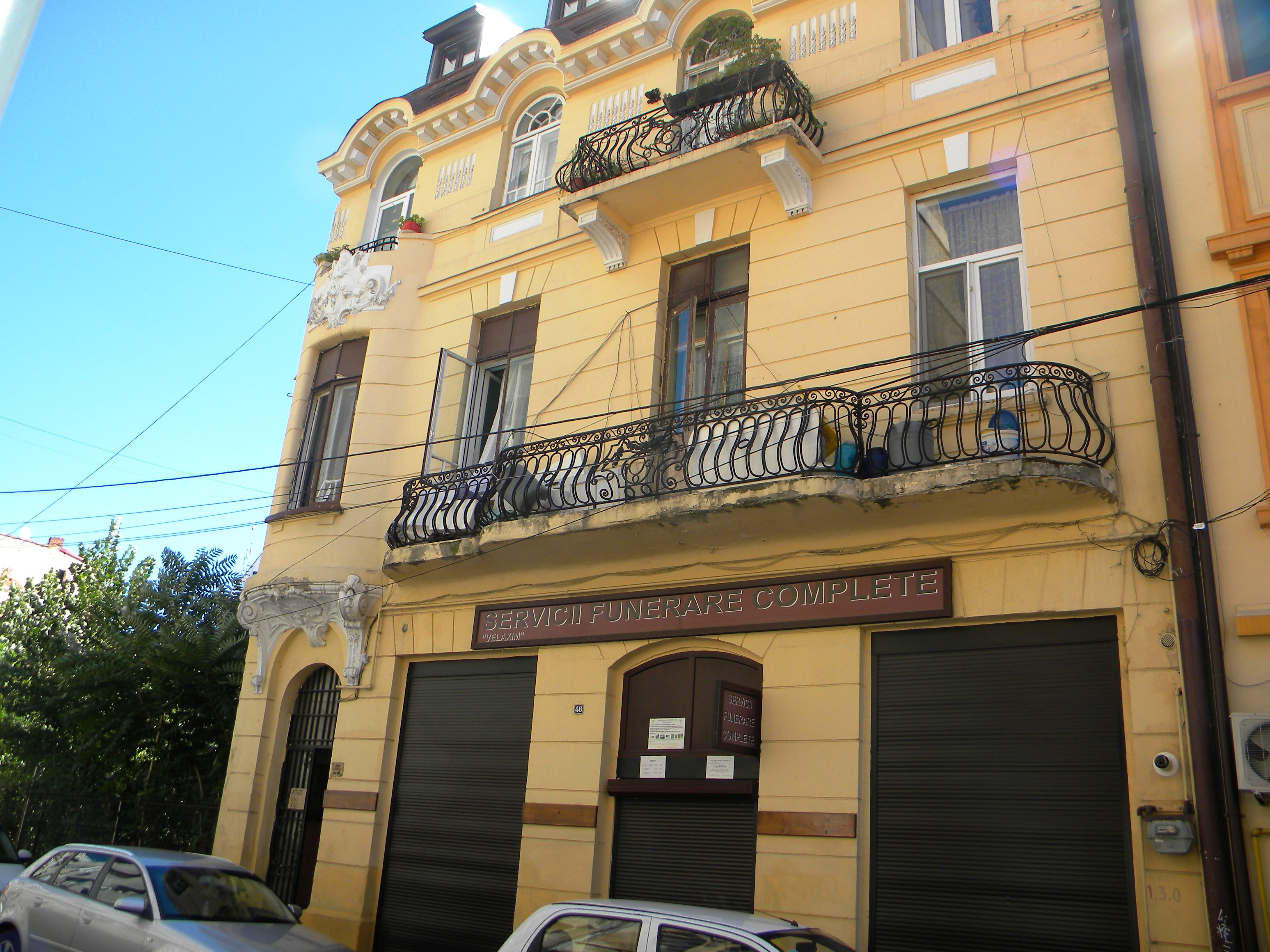 Bucuresti, Romania, Imobil pe Str. Coltei nr. 46, sect. 3